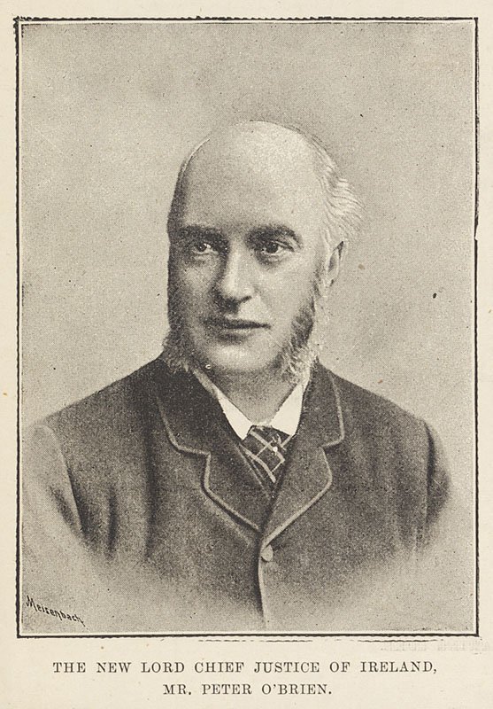 Peter O'Brien, 1st Baron O'Brien (1842-1914)